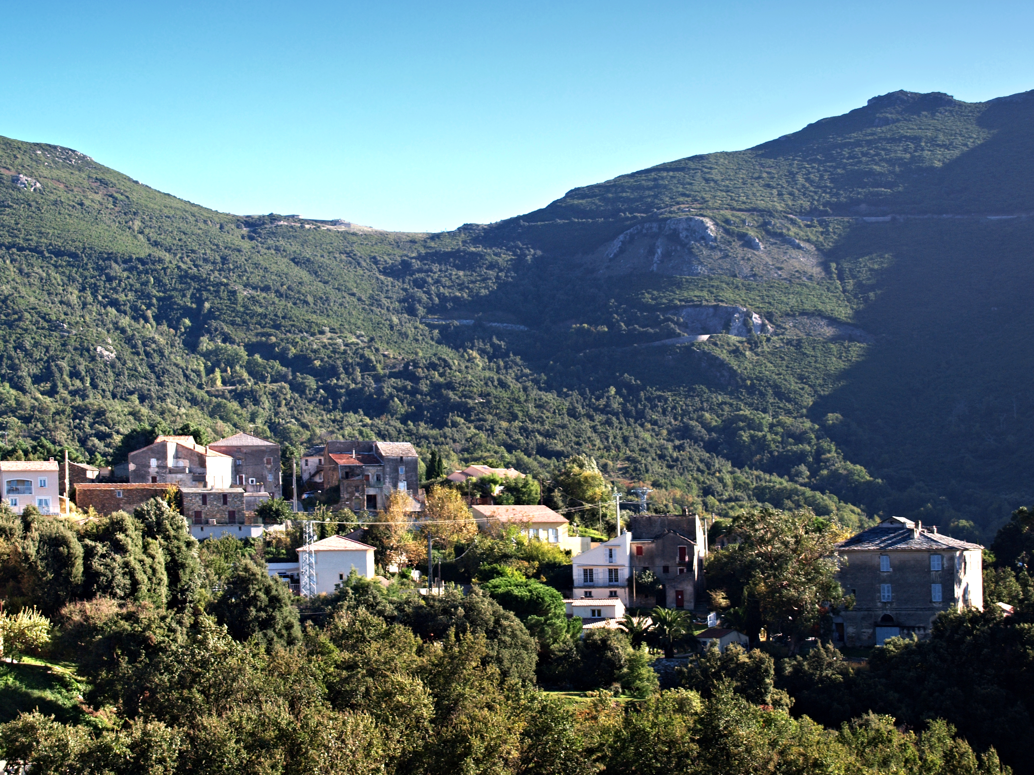 Barbaggio (Corse) - Hameau de Poggio